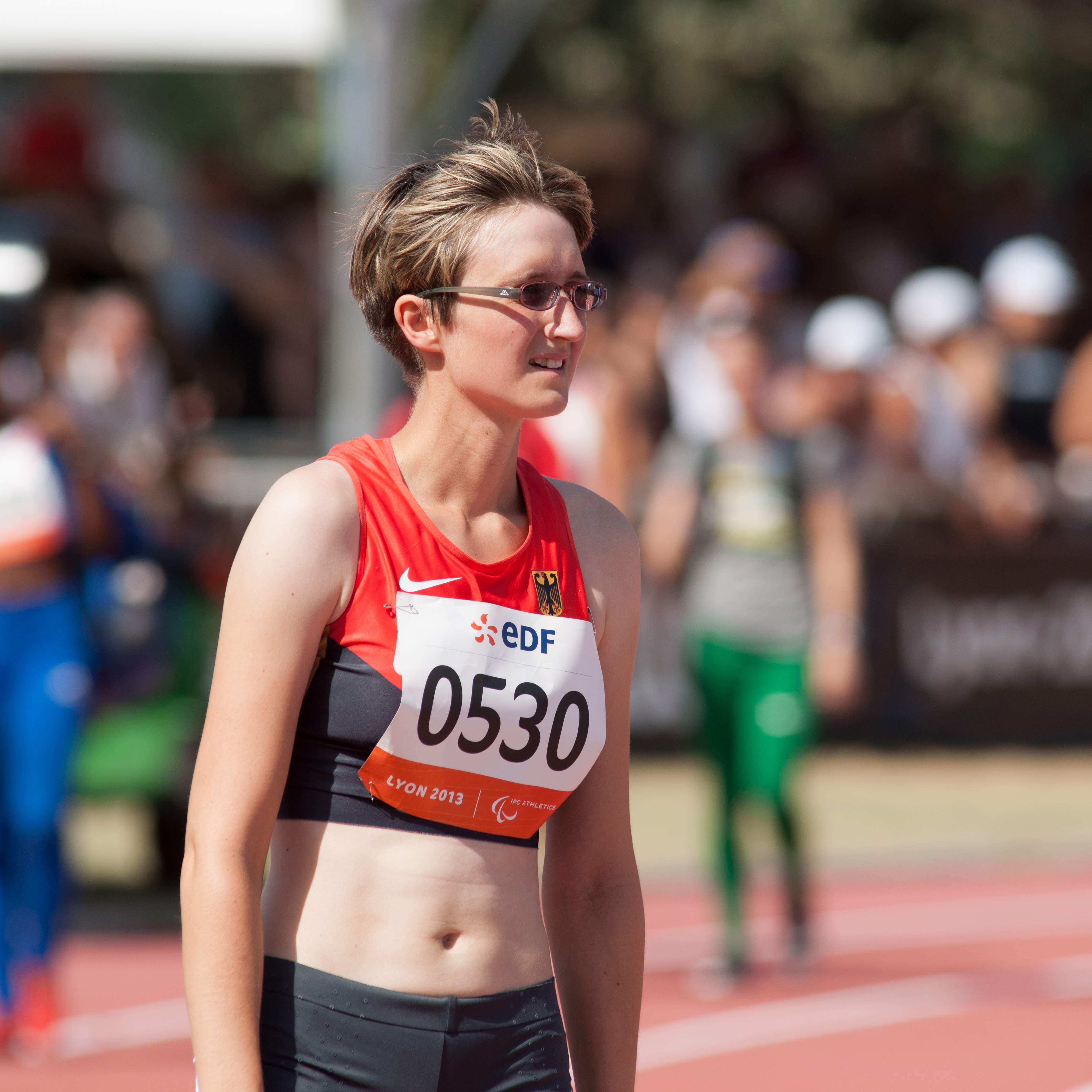 Championnats du monde d'athlétisme IPC 2013. 100 mètres féminin T36.